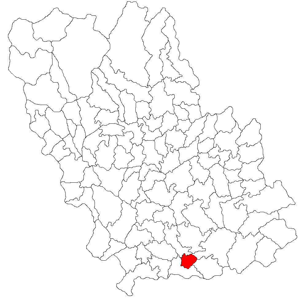 Categorie:Hărţi ale judeţului Prahova